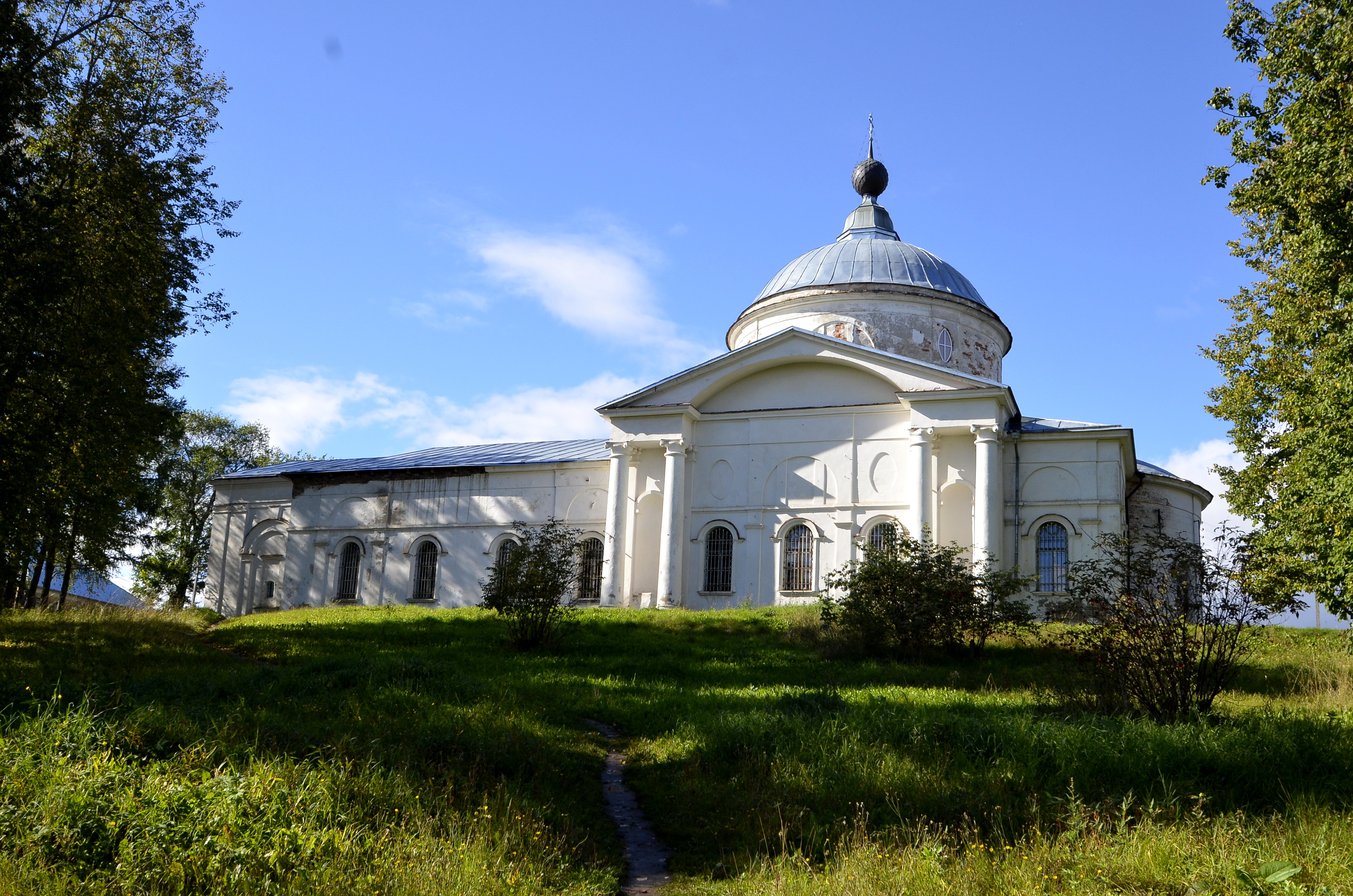 Никольский собор (Ярославская область, Мышкин, культуры площадь)